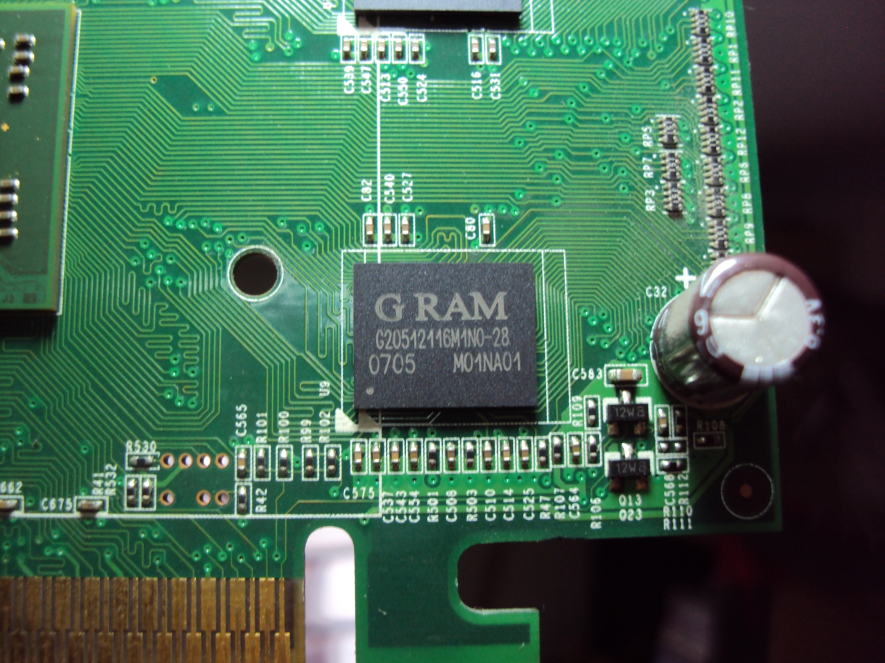 Foto de módulo de memoria GDDR2 de un tarjeta Nvidia 6200 AGP.